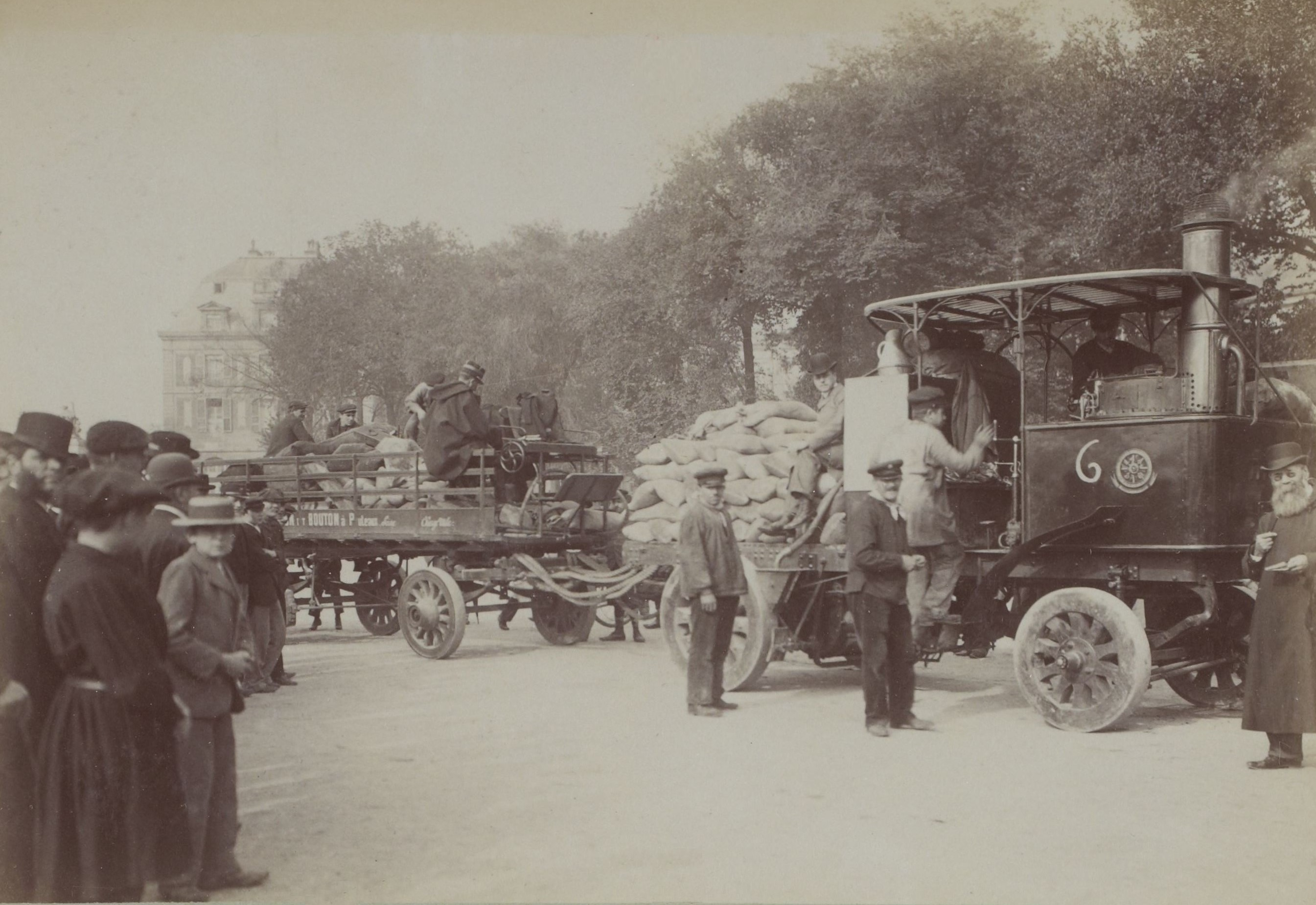 [Collection Jules Beau. Photographie sportive] : T. 10. AnnÃ©e 1899 / Jules Beau : F. 32v. [Poids lourds]